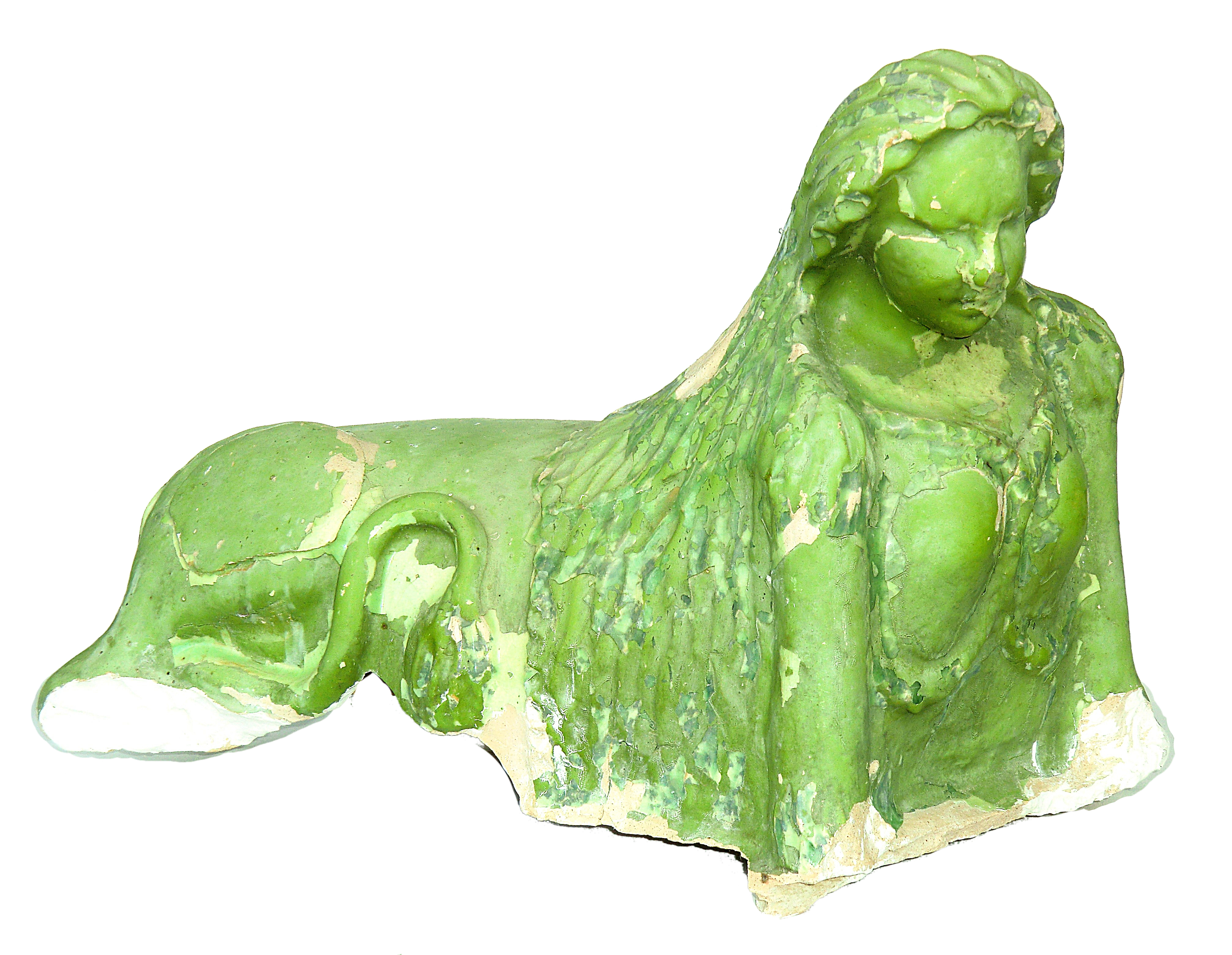 Grünglasierte Sphinx als Ofenaufsatz aus Niederbayern / Rottal